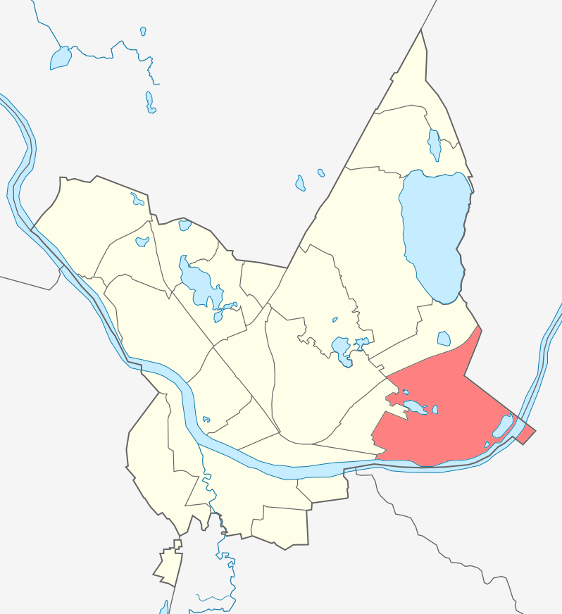 Микрорайон Ругели карте Даугавпилса.